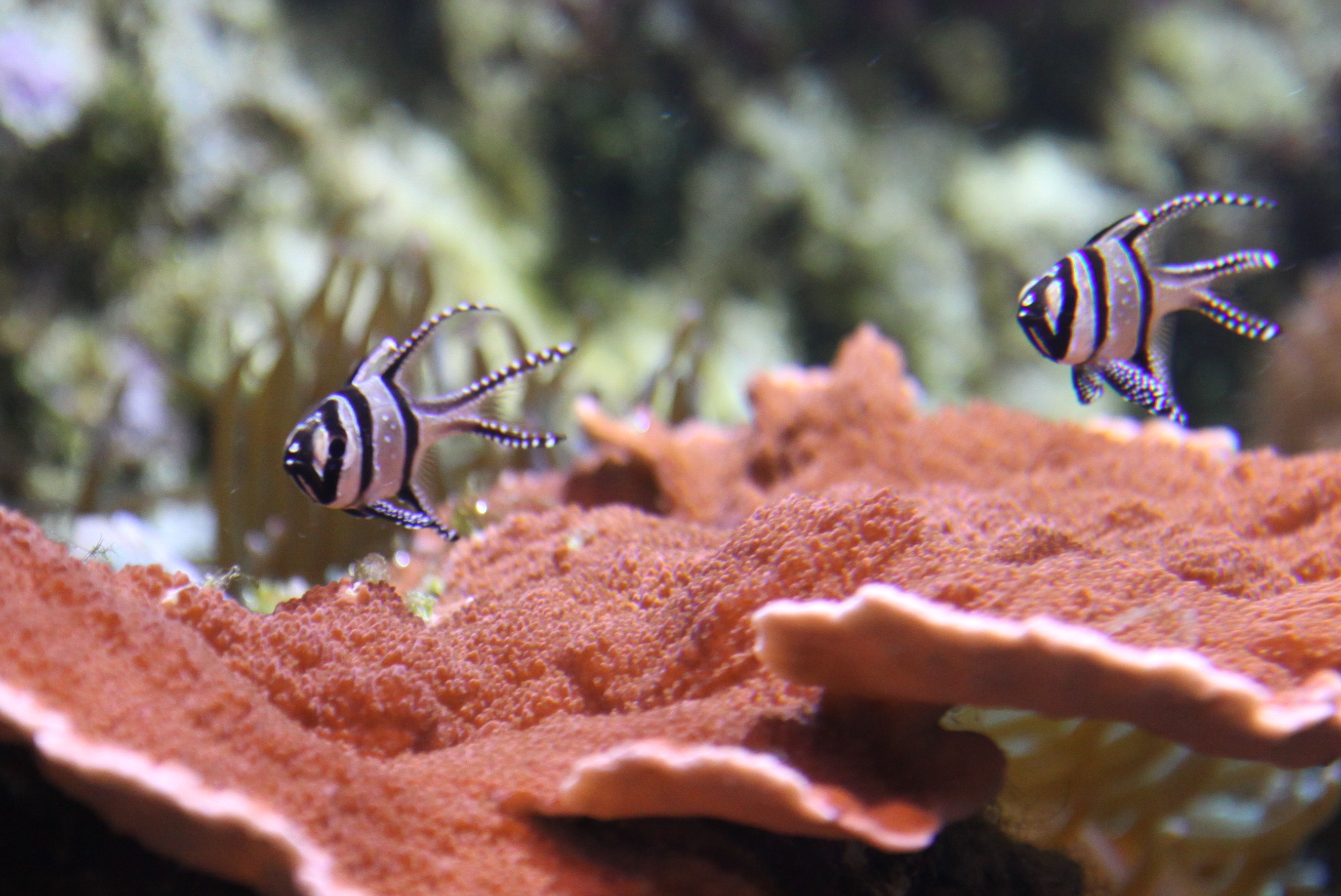 Apogon de Kaudern à l'aquarium de la porte dorée à Paris.